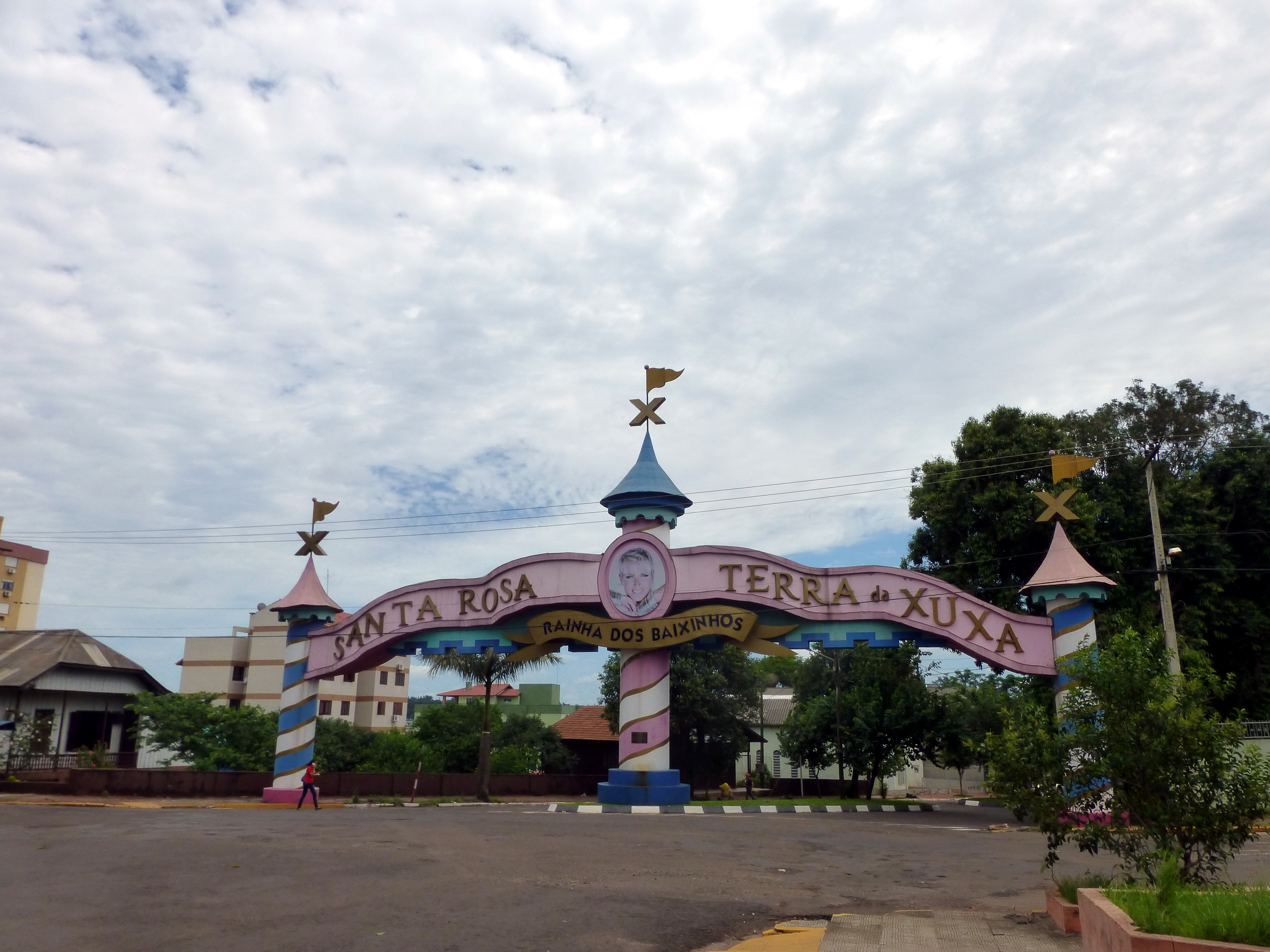 Pórtico Tierra de Xuxa en Santa Rosa, Rio Grande do Sul, Brasil.